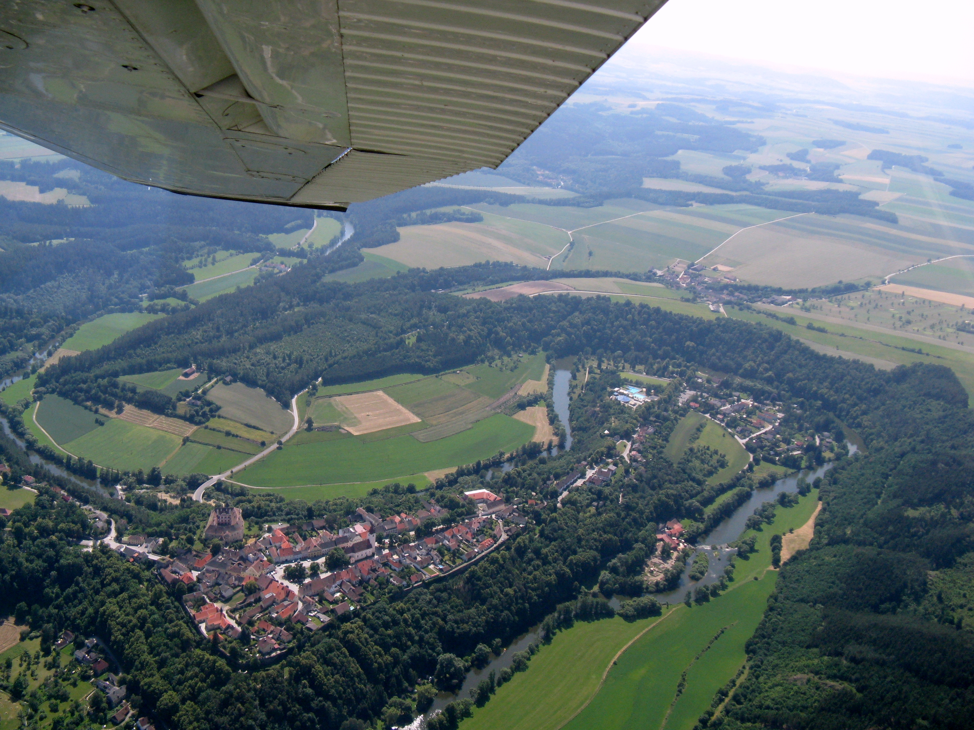 Historischer Stadtkern von Drosendorf (Niederösterreich) und der umgebenden Thayaschleife (Ansicht von Südosten)